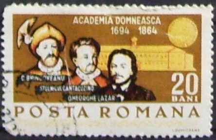 Source: Posta Română